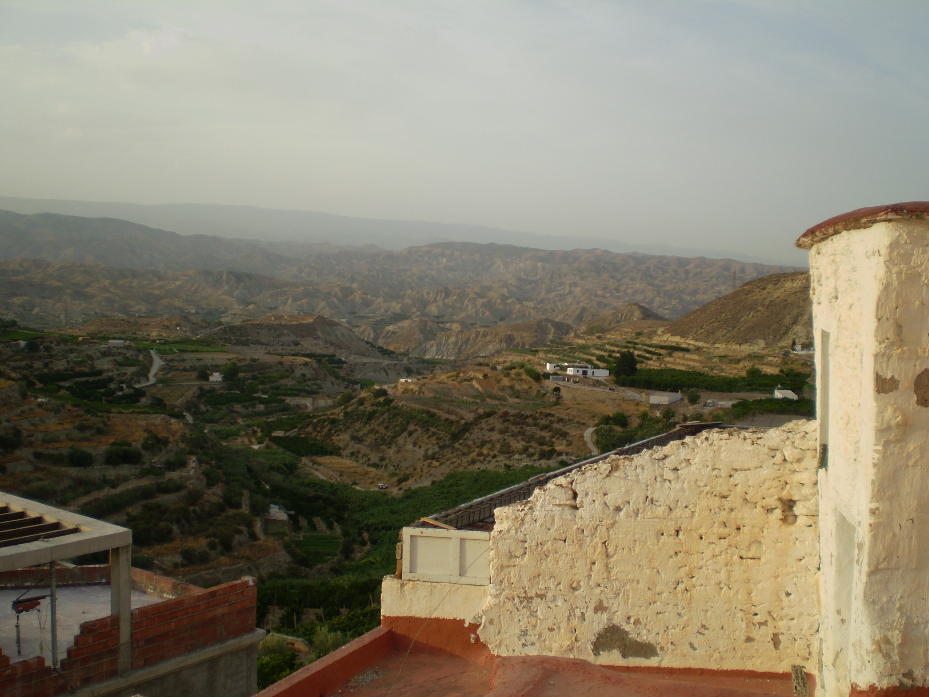 Barranco del Agua o del Alfarax visto desde Huécija (Almería-España)